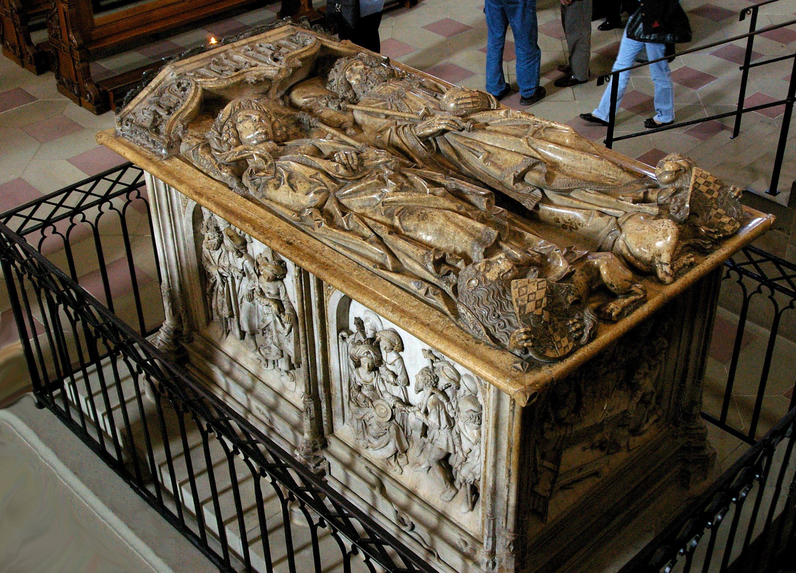 Bamberger Dom - Grab Heinrich und Kunigunde